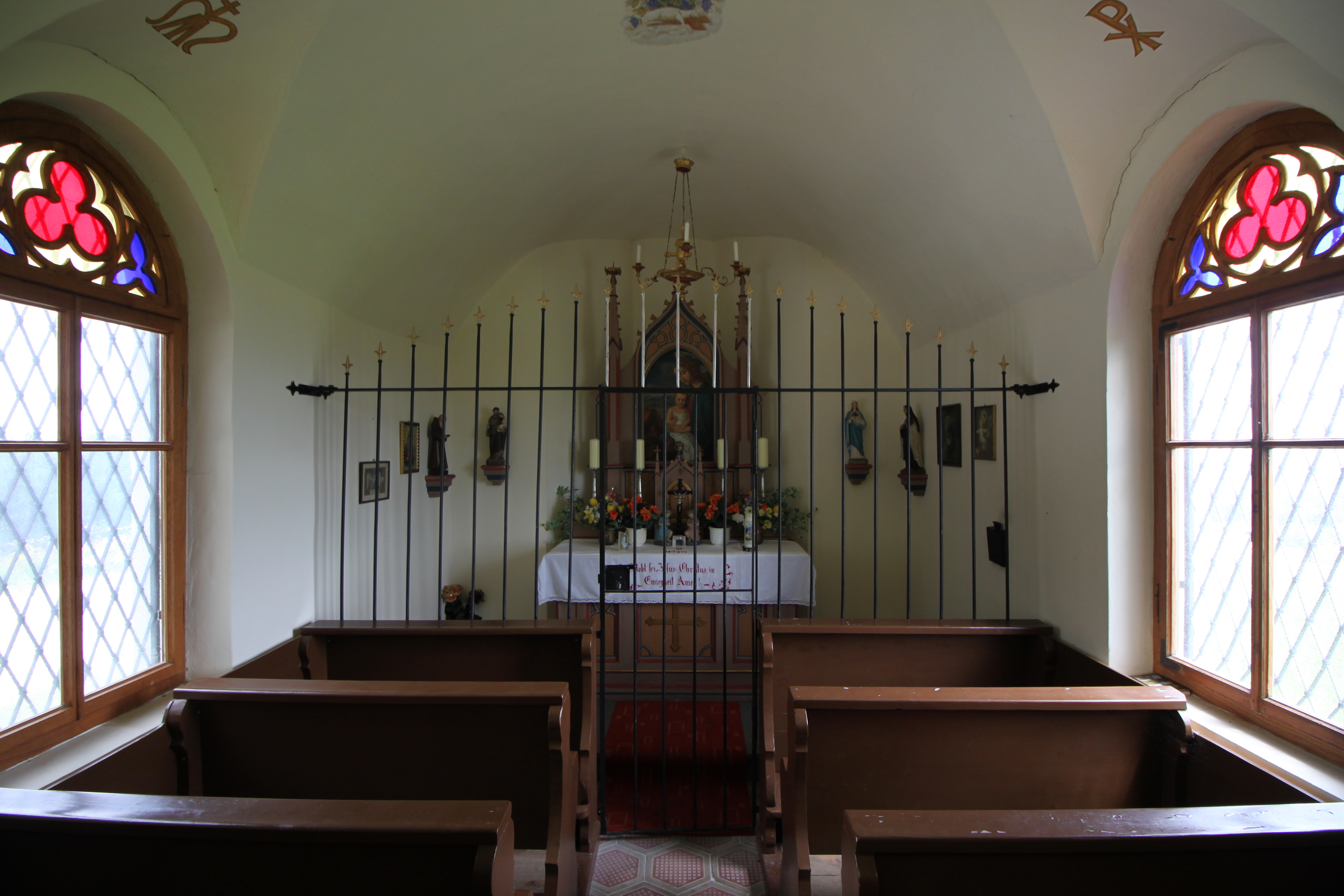 Kaiser-Franz-Joseph-Jubiläumskapelle am Haunsberg, Kapelleninneres, Blick zur Apsis, der Altarraum ist mit einem Gitter abgegrenzt, die Fenster haben im Rundbogenbereich eine Holzmaßwerk und eine farbige Verglasung